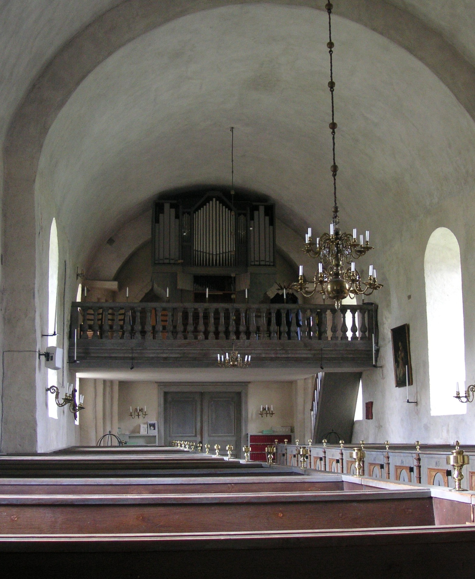 Lovö kyrka på Lovön, Ekerö kommun. Interiör.